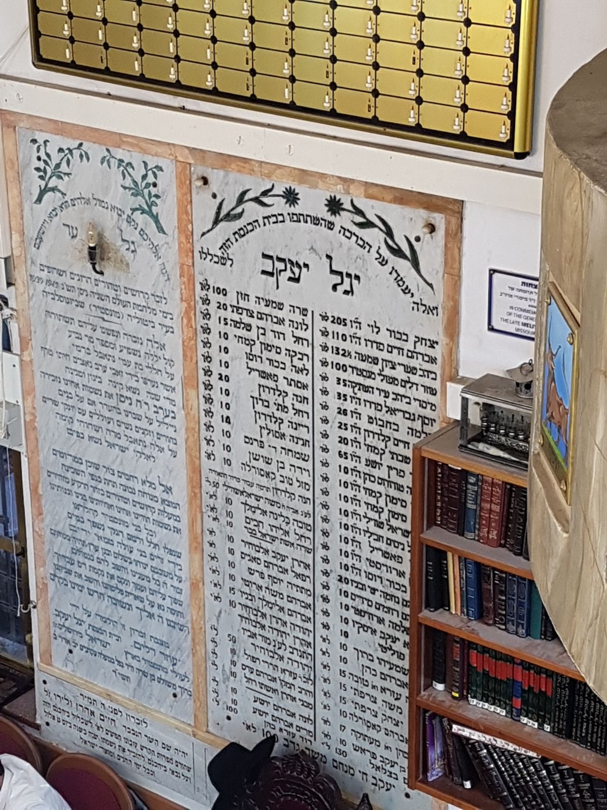 לוח הנצחה בתוך בית הכנסת "יגל יעקב" בירושלים